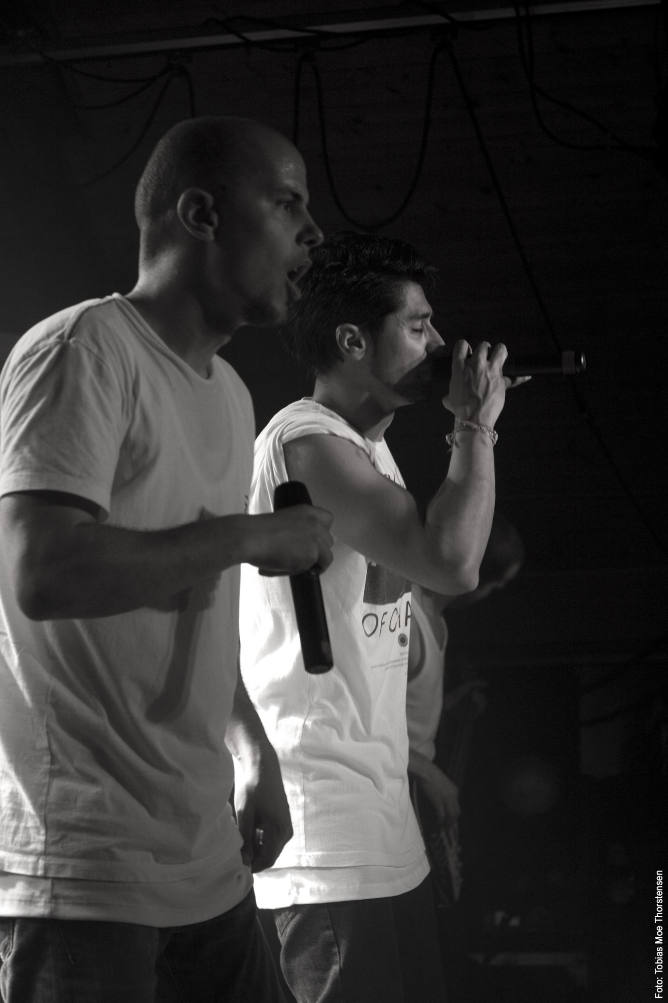 Bilde fra Karpe Diem konsert. Tatt av: Tobias Moe Thorstensen.